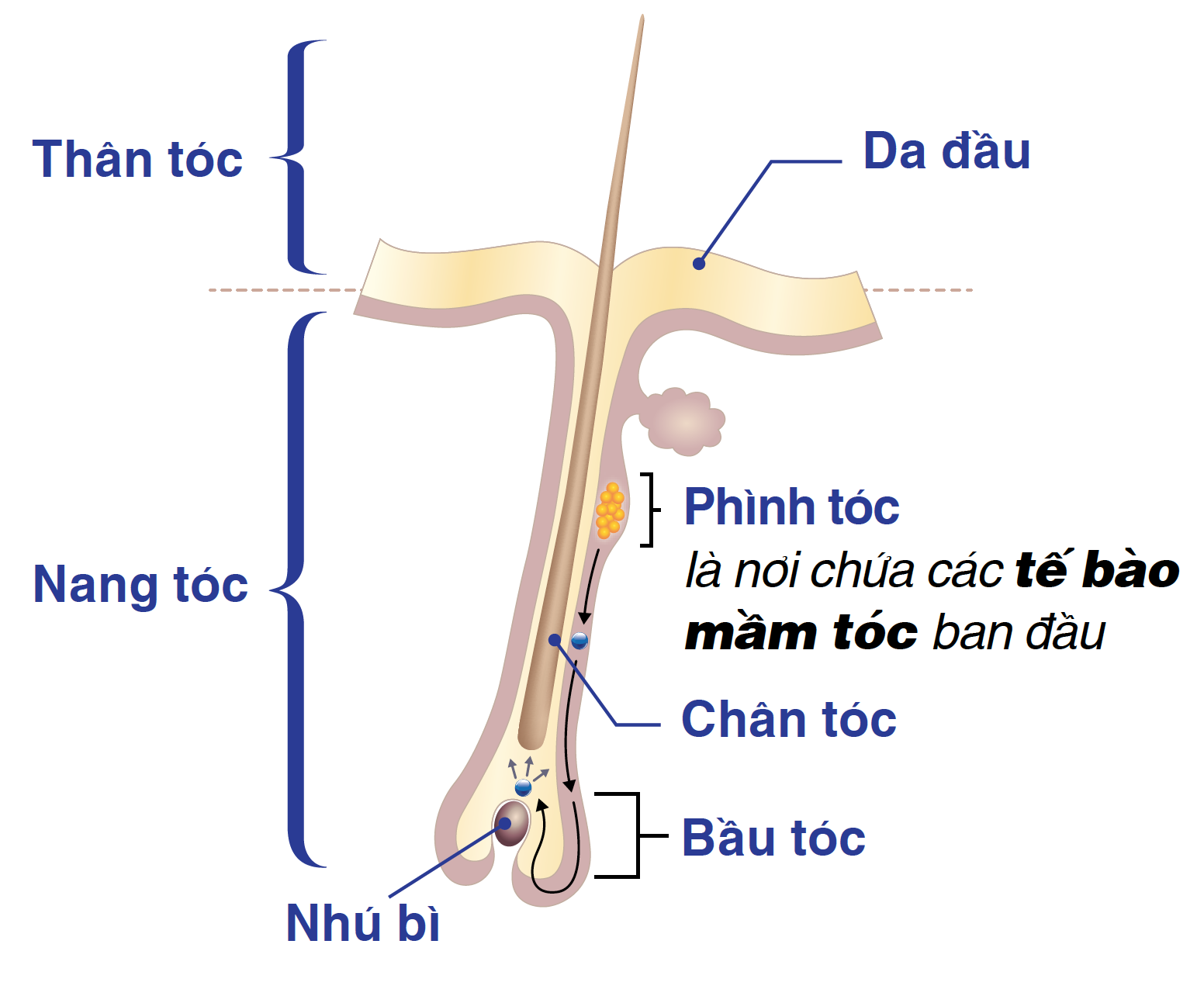 Các bộ phận của sợi tóc